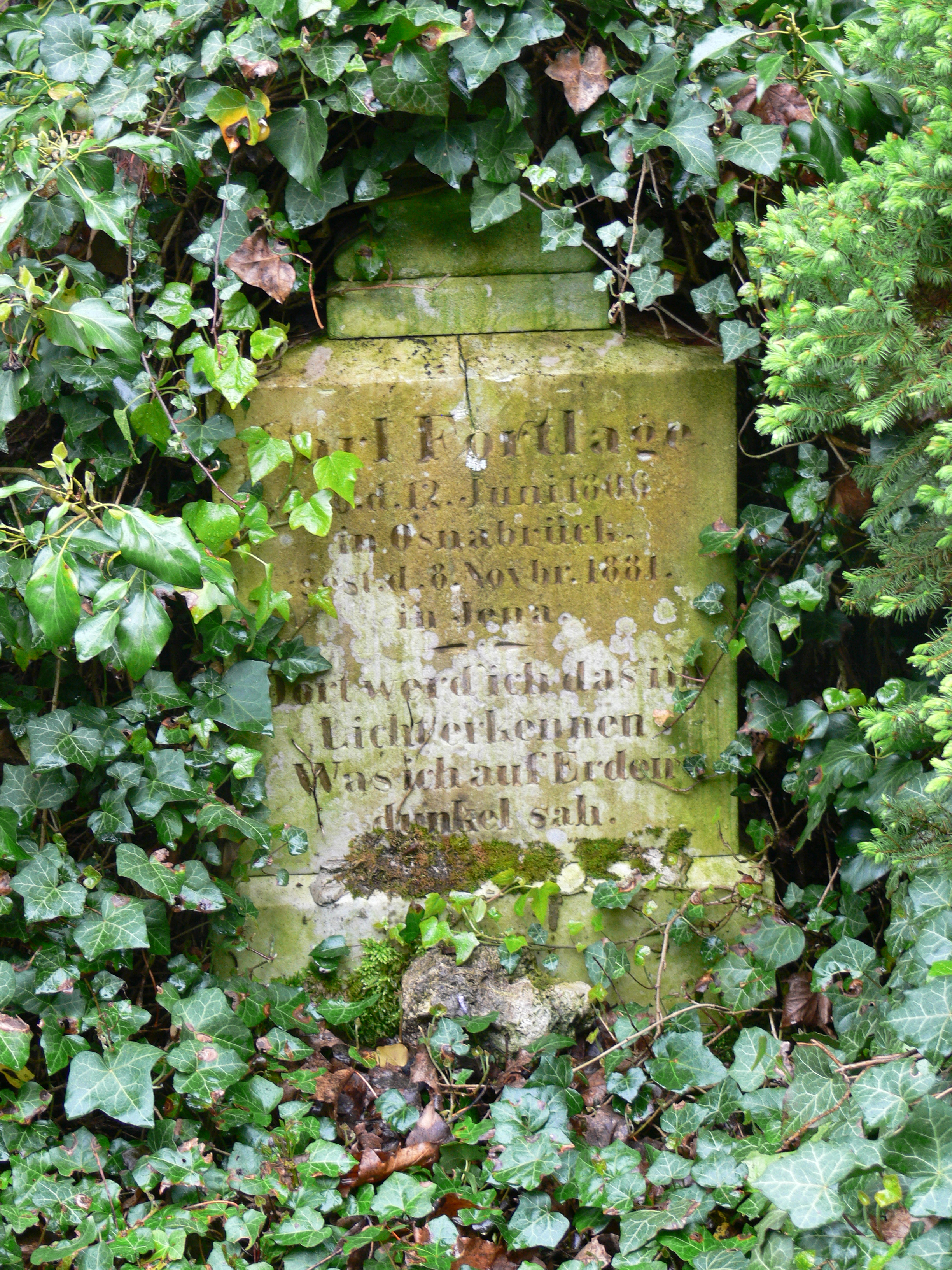 Jena, Johannisfriedhof Grabmal Karl Fortlage (1806–1881), Professor der Philosophie